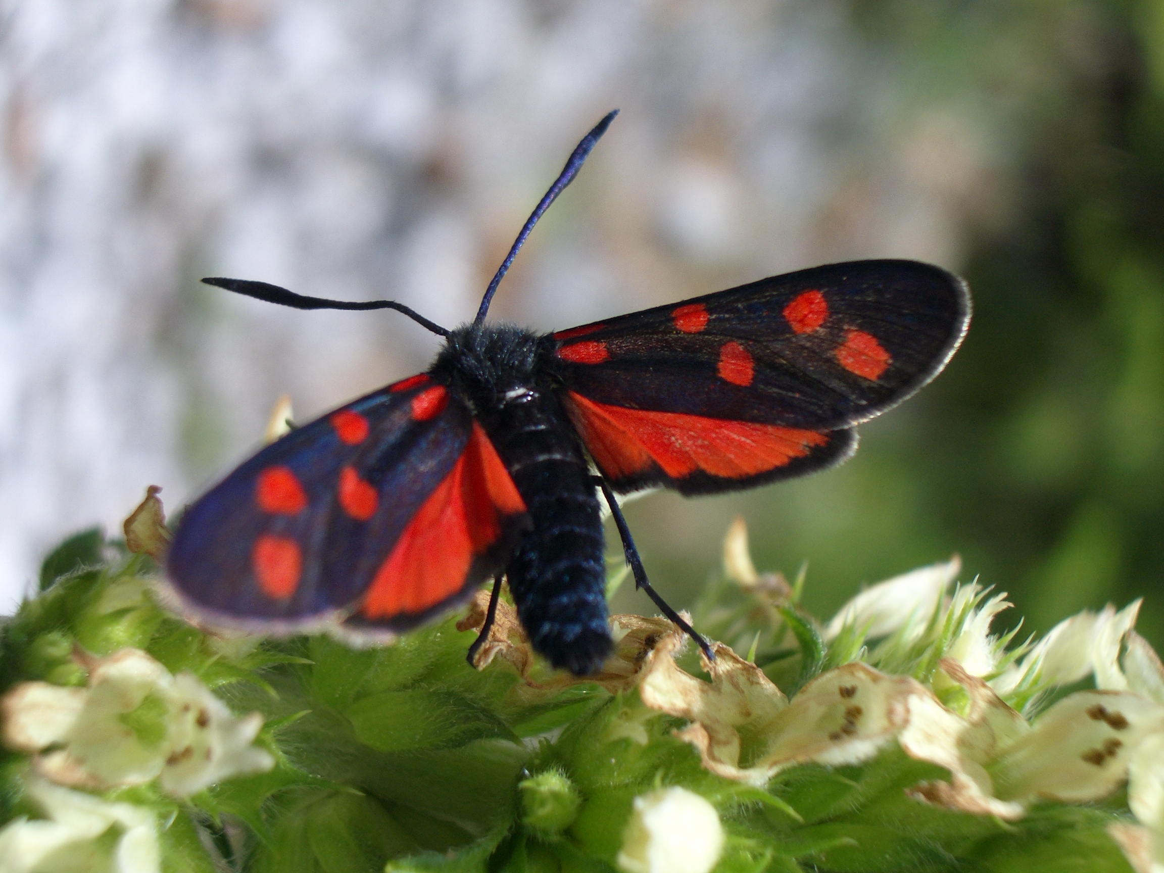 Zygaena transalpina Julian Alps Slovenia